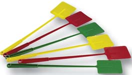 Assortert utval av flugesmekkarar.